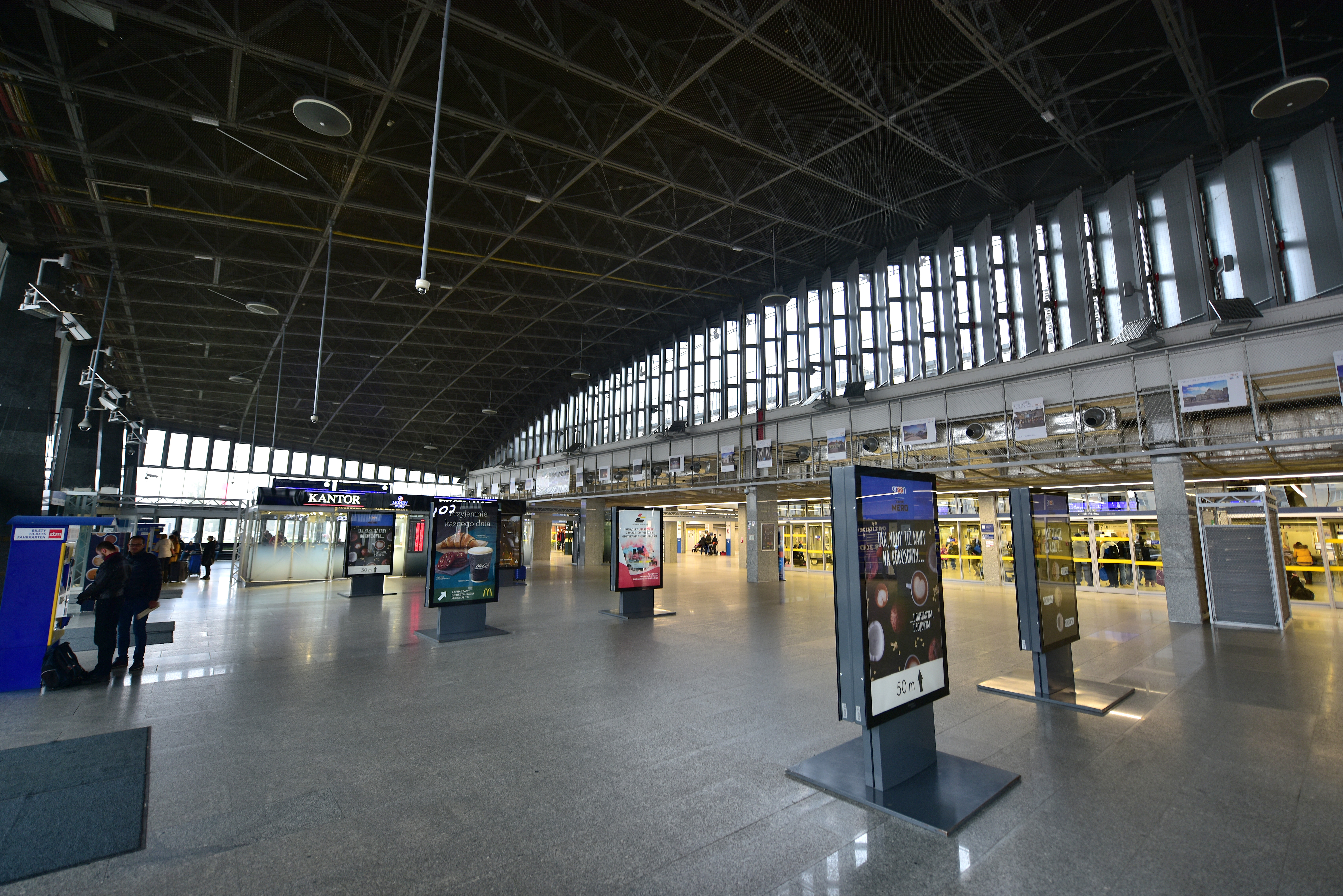 Wnętrze dworca Warszawa Wschodnia